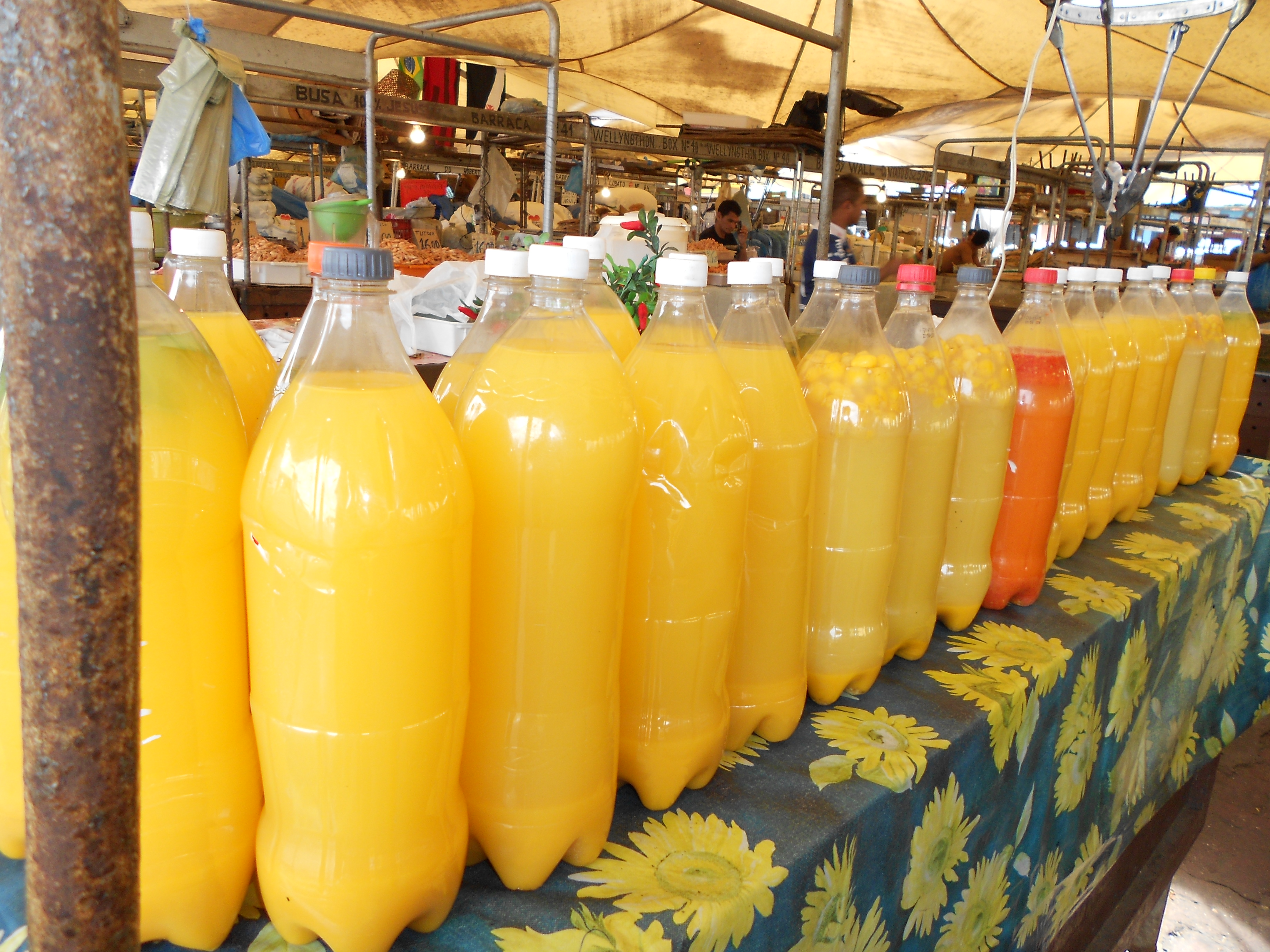 TUCUPI